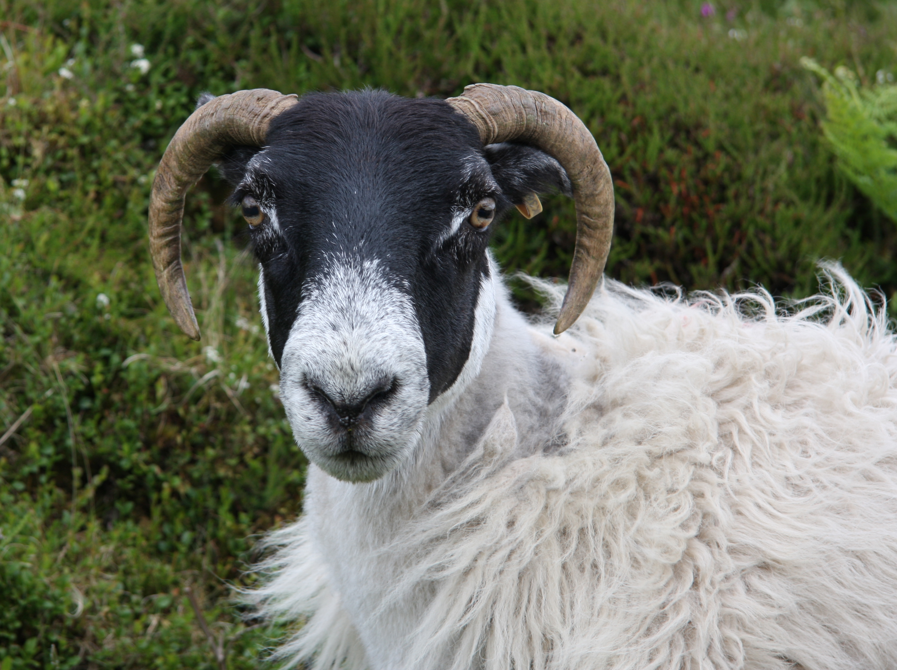 Close up a Swaledale ewe on roadside in Dartmoor.